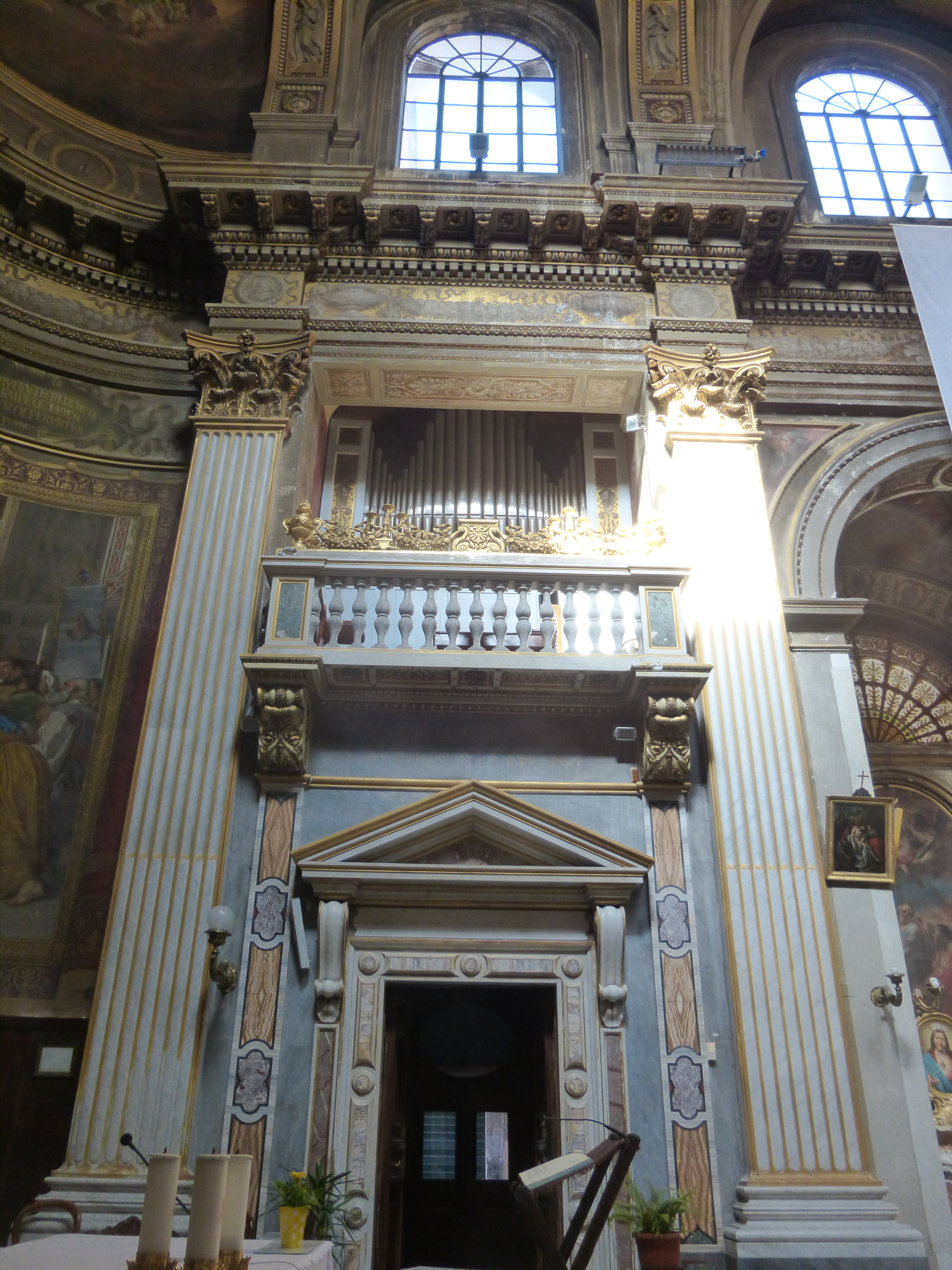 Roma, S. Lucia del Gonfalone, organo